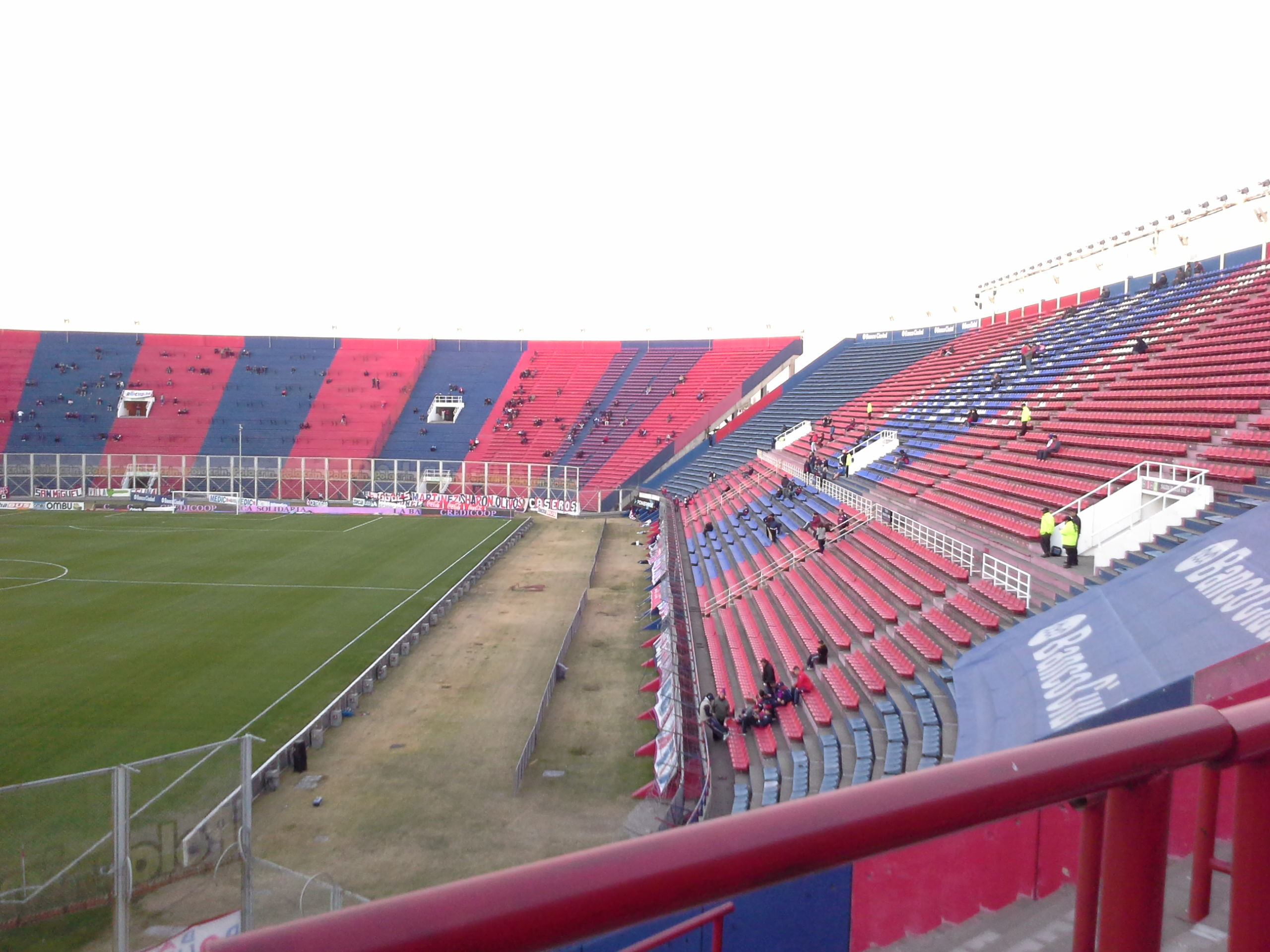 Platea Sur Nuevo Gasometro (San Lorenzo de Almagro)